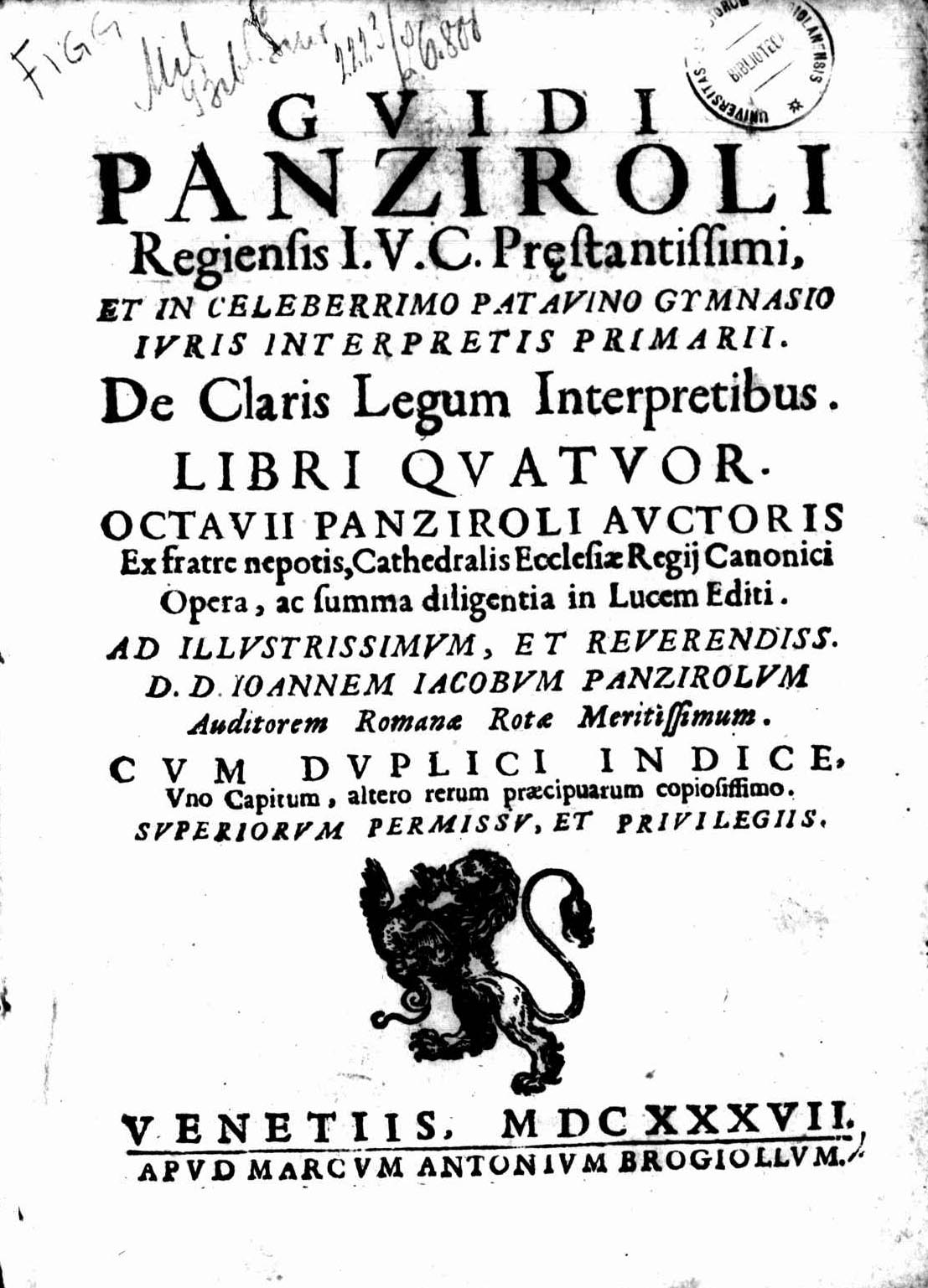 Frontespizio